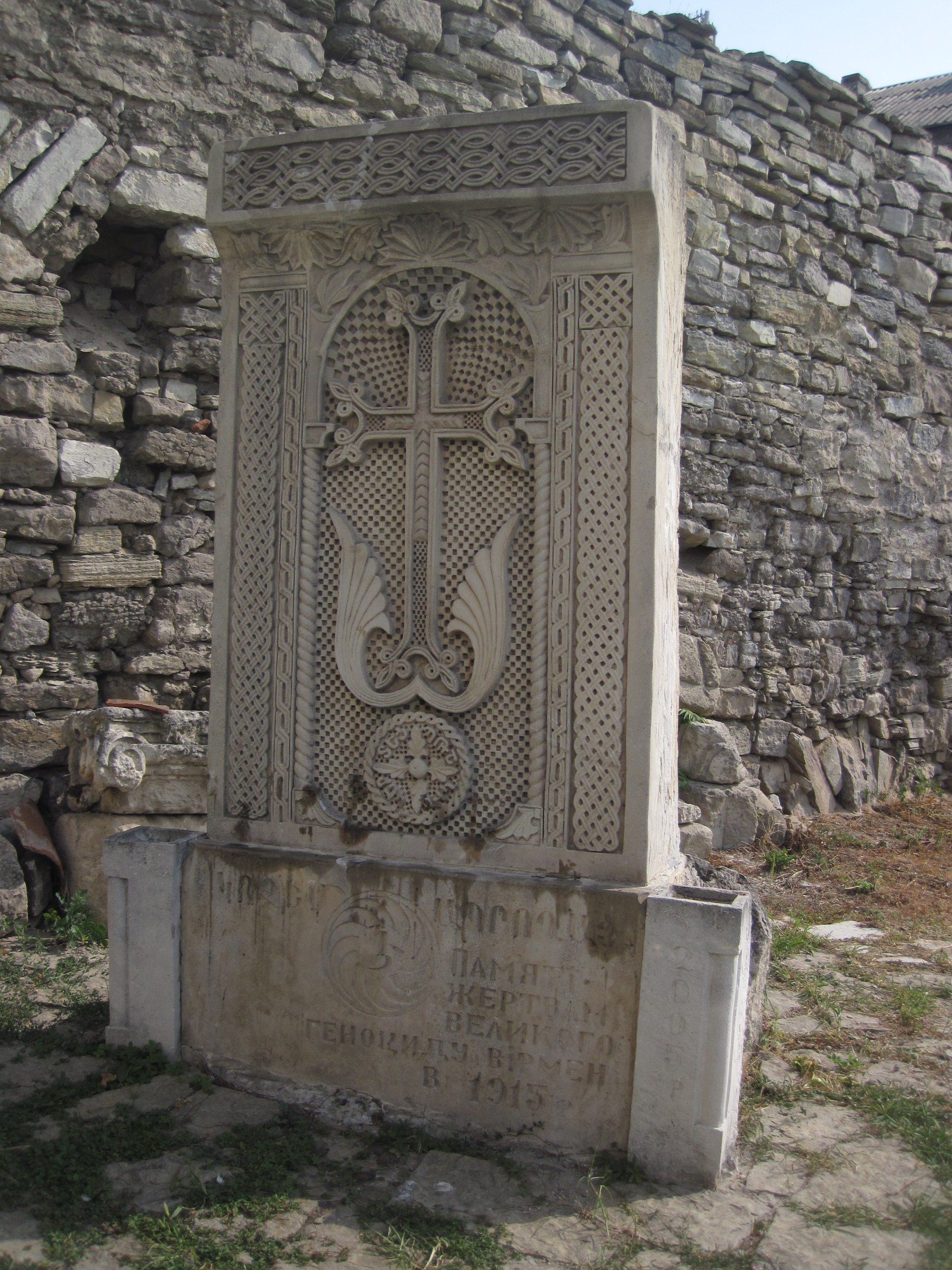 Брама і огорожа вірменського костелу, Кам'янець-Подільський, вул. Вірменська, 1